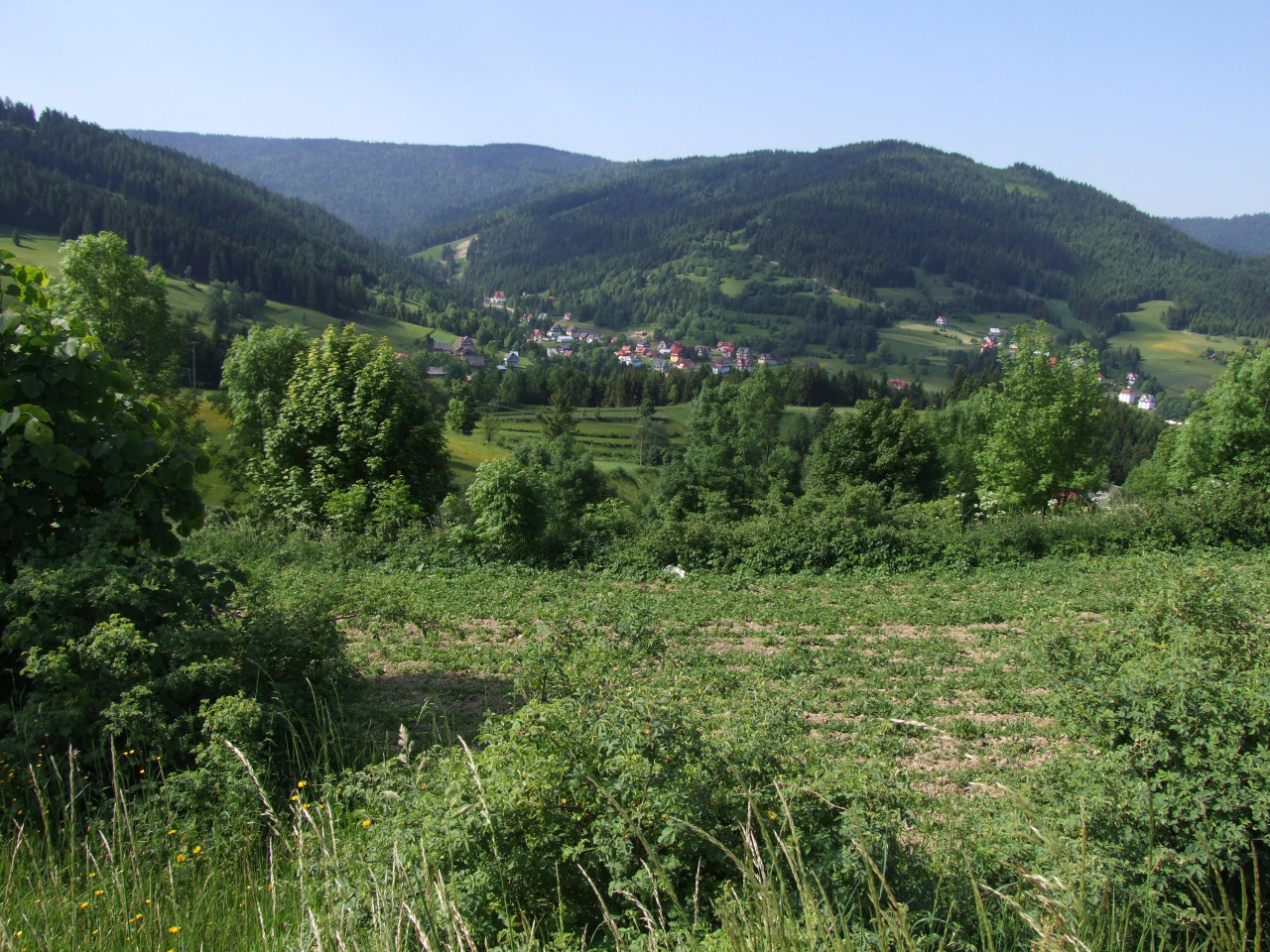 Widok na Koninki i Tobołów